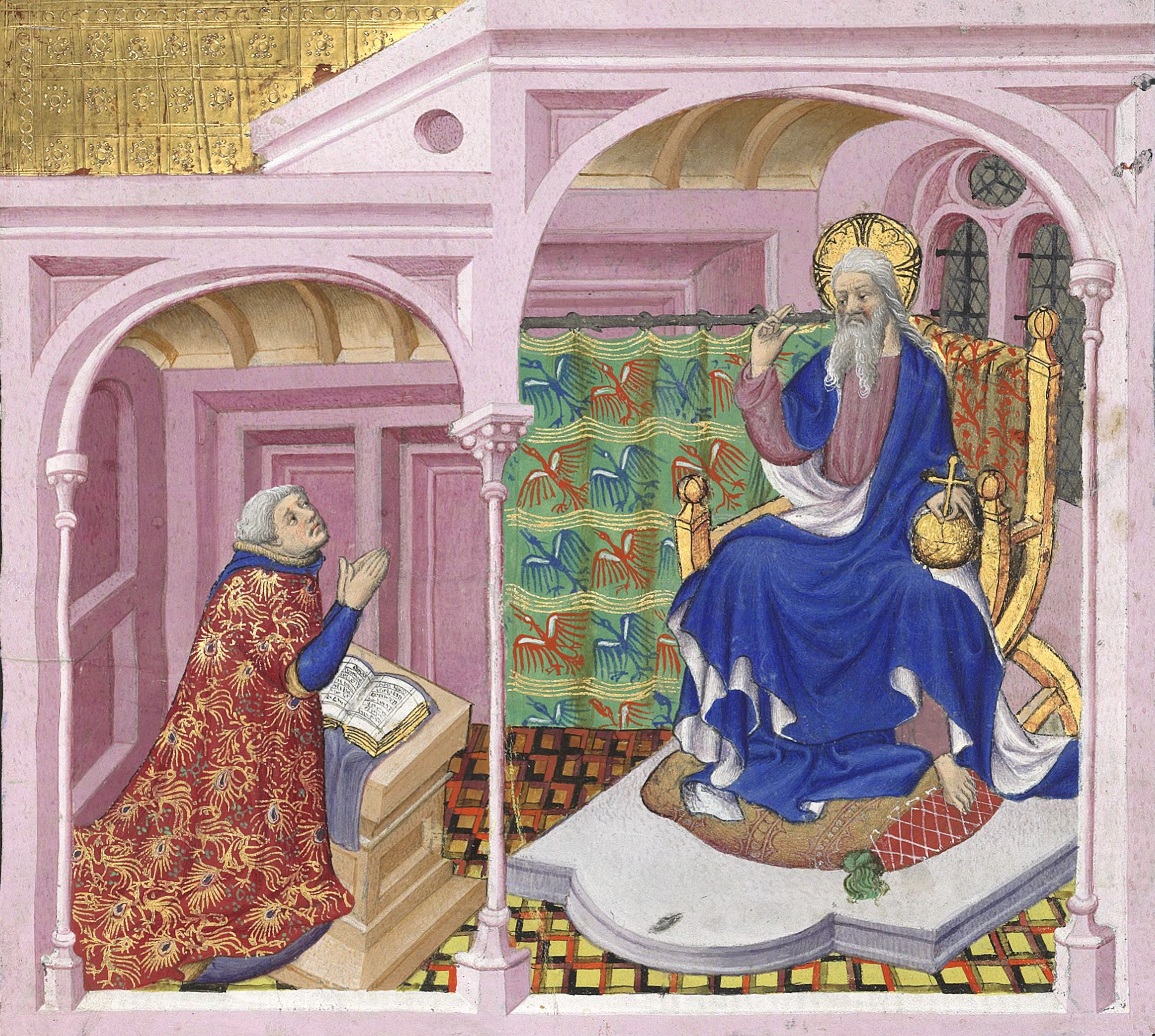 Gaston Fébus en prière. (Gaston Fébus, Livre des oraisons, Paris, BnF, Fr. 616, fol. 122)